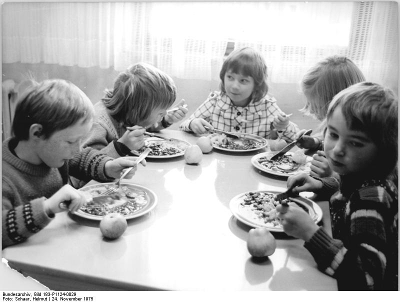 Dillstädt, Schüler beim Essen ADN-ZB Schaar 24.11.1975 Bez.Suhl: Landgaststätte für Schulspeisung- Siehe DDR-Aktuell 8 v. 24.11.75- Die rekonstruierte Landgaststätte "Zur Henne" in der Gemeinde Dillstädt im Kreis Suhl dient seit dem 24. Nov.1975 Schülern des Ortes auch als Schulspeisungsraum. Den Kindern, die bisher in weniger geeigneten Räumen essen mußten, wird nun in angenehmer Atmosphäre ein schmackhaftes Mittagessen aus der Küche der modernen Gaststätte angeboten.